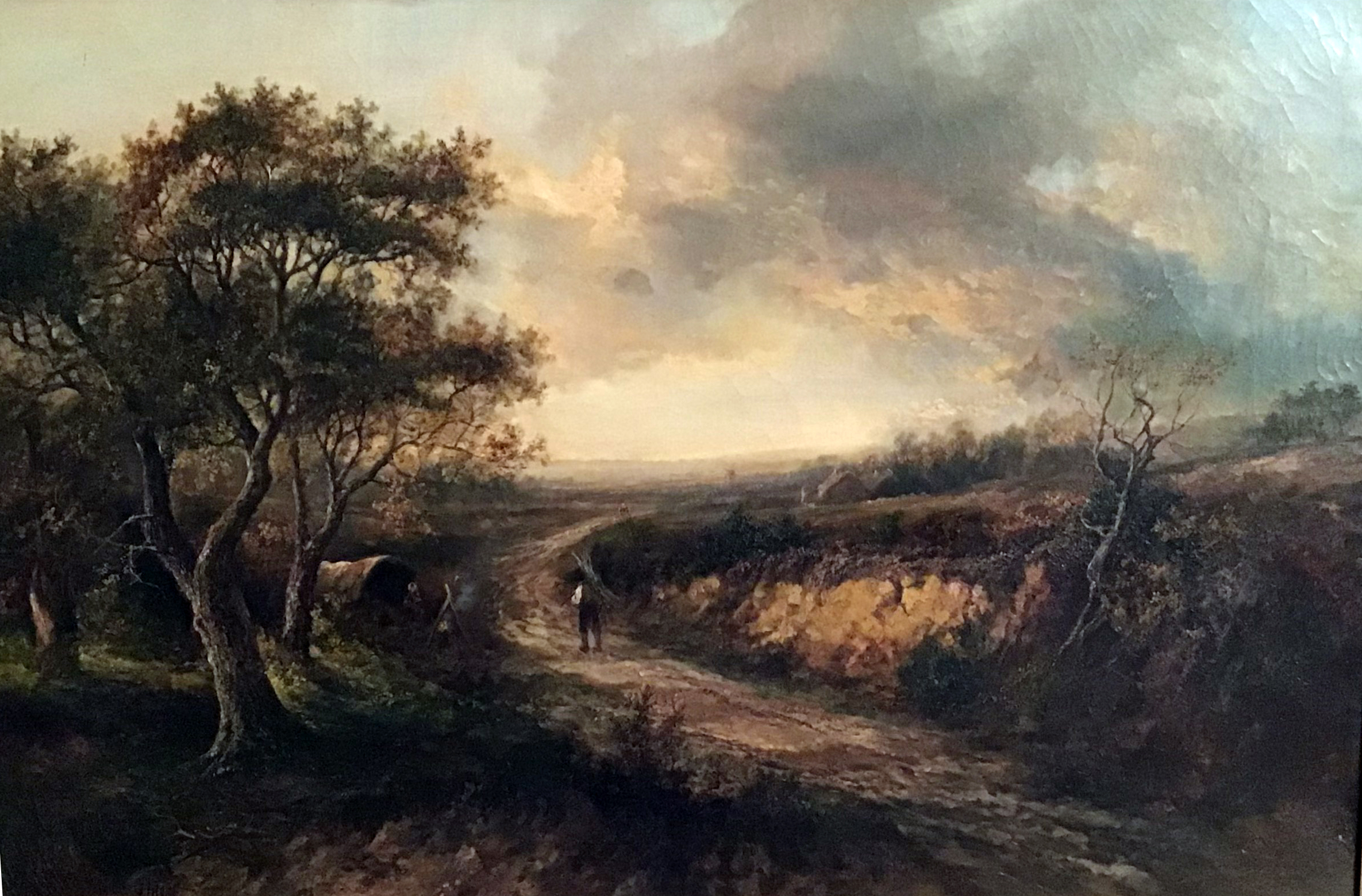 Öl auf Leinwand, 2. Hälfte des 19. Jahrhunderts, Privatbesitz